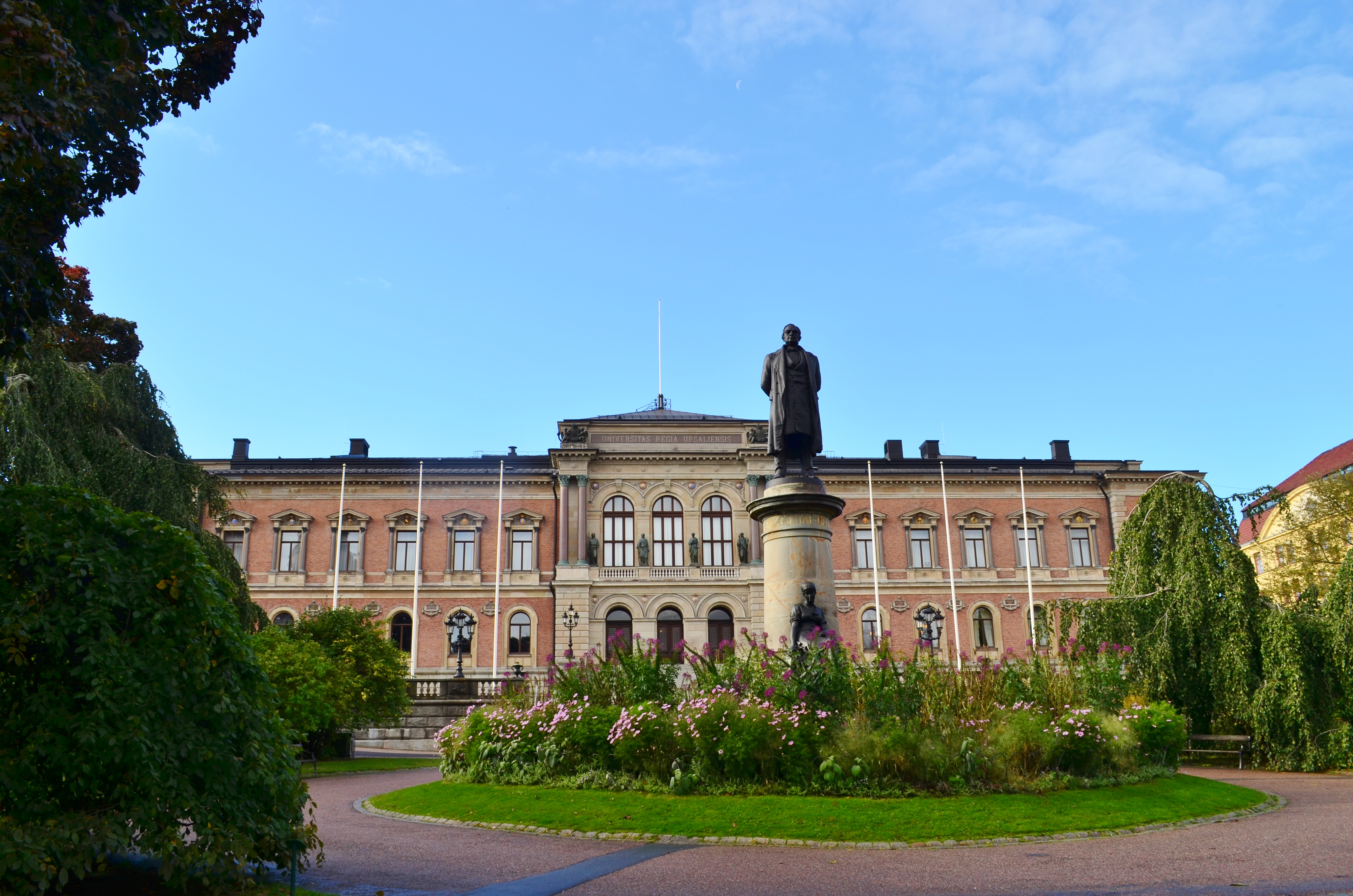 Universitetshuset i Uppsala